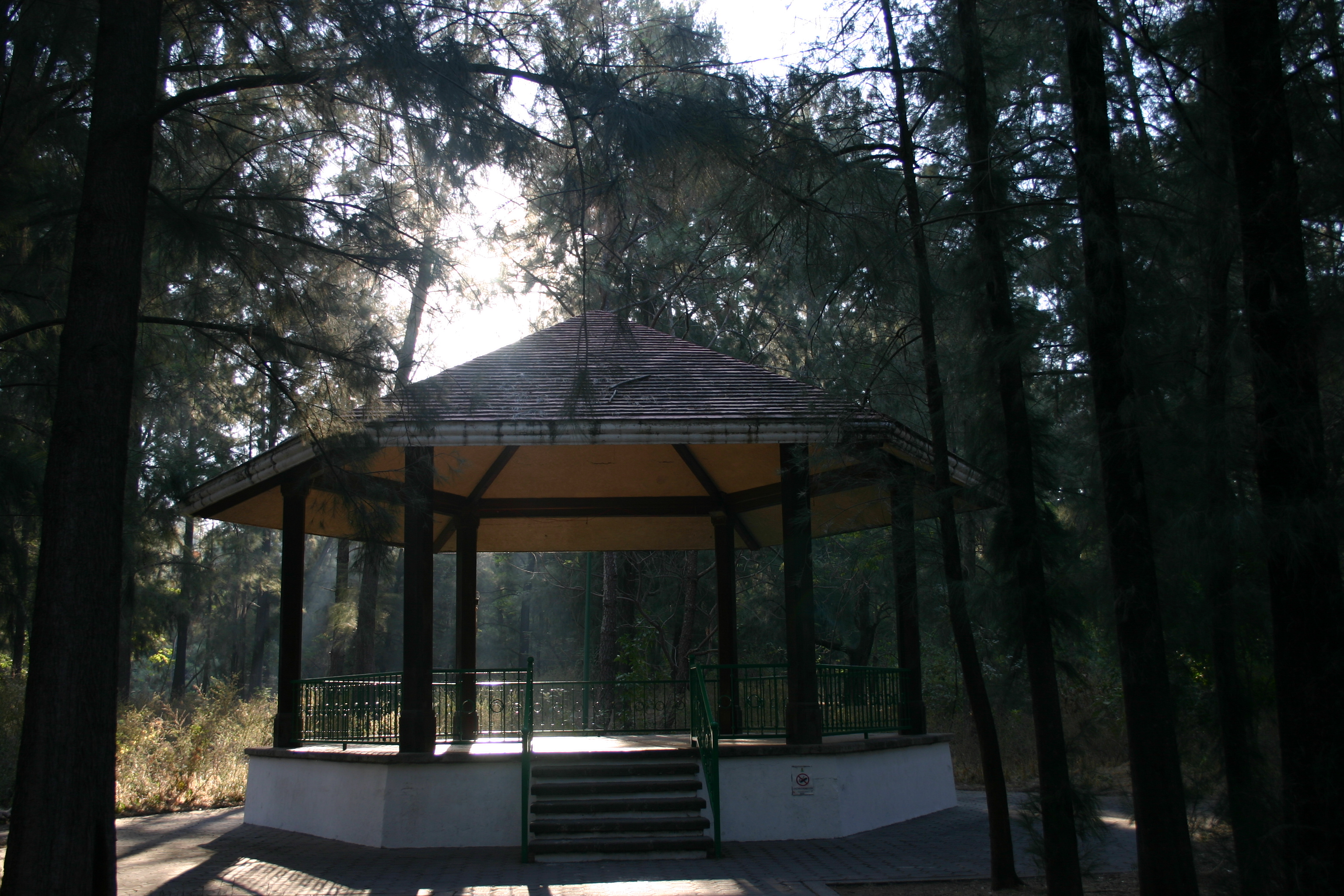 Un kiosko dentro del parque de los colomos.